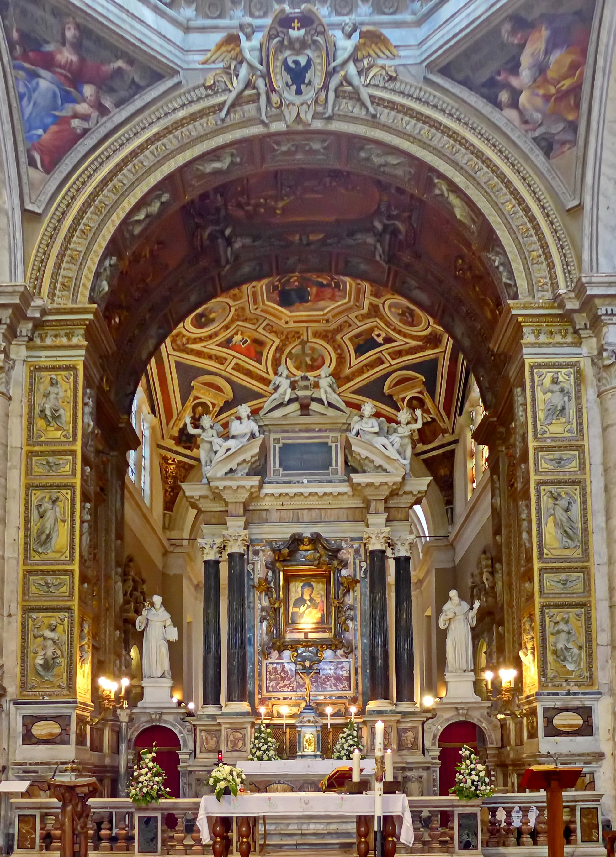 Rom - Basilika Santa Maria del Popolo